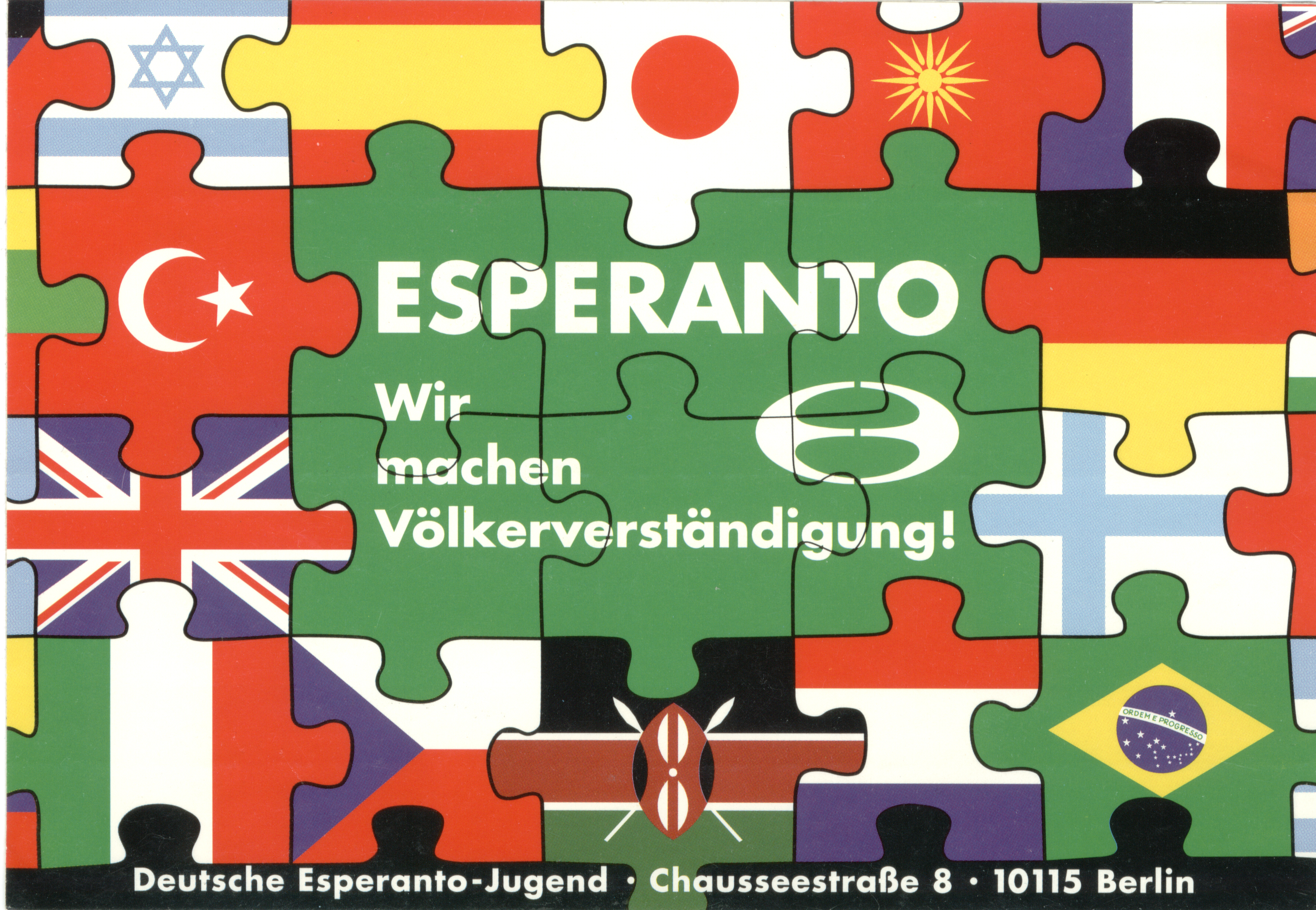 Glumarko de Germana Esperanto-Junularo. Ideo kaj koncepto Tanja Maier, ellaboro de Rolfo Ernst por GEJ.